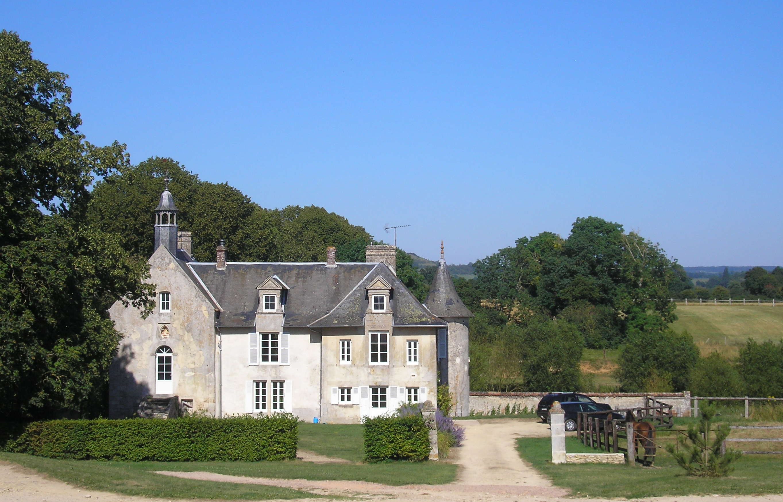 Fel (Normandie, France). Le Logis.